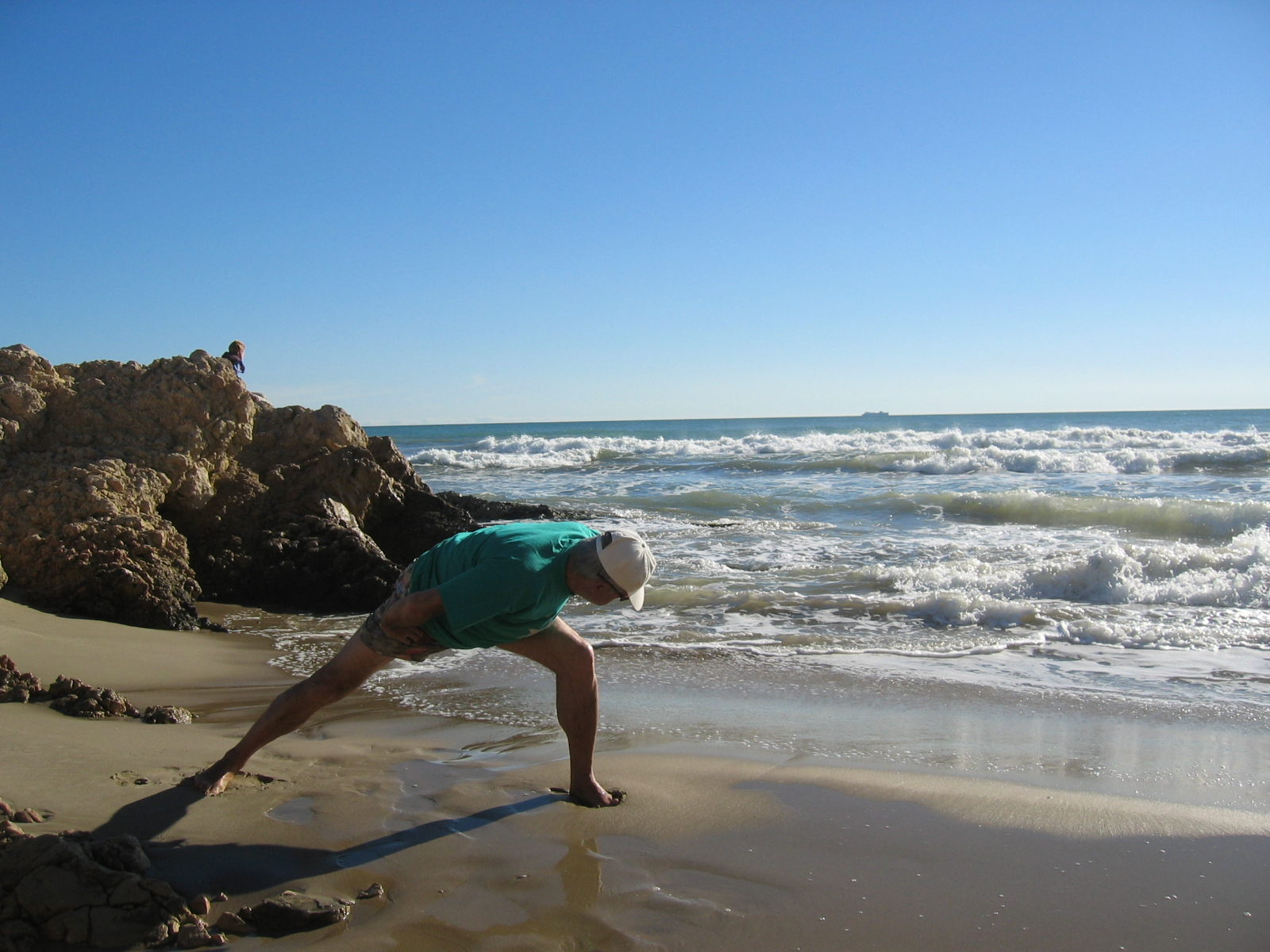 5è moviment de txi kung - Baduanjin foto meva novembre 2006 Joan Inglada Lliure ús